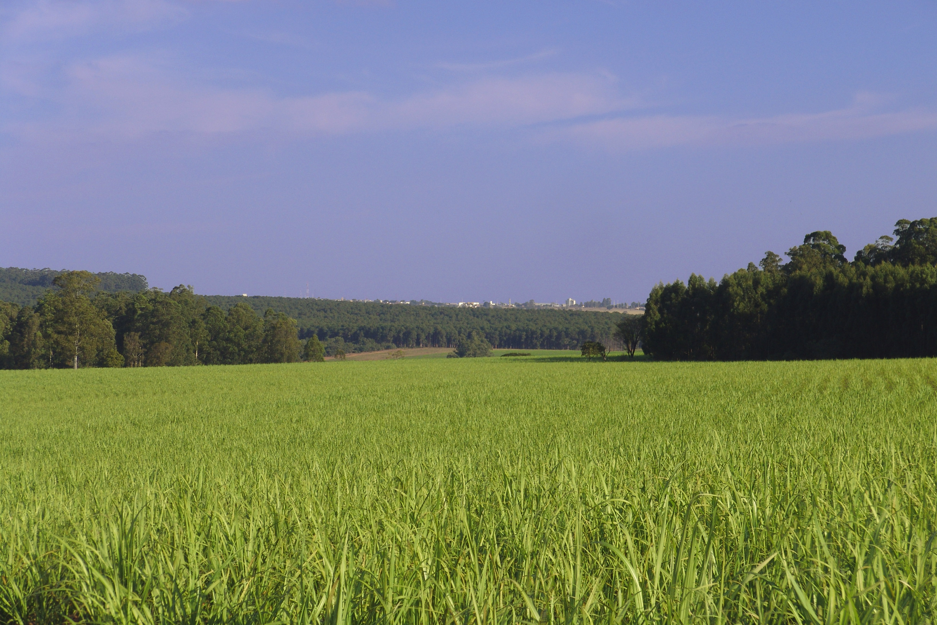 Canavial (cana-de-açucar), Avaré, São Paulo, Brasil